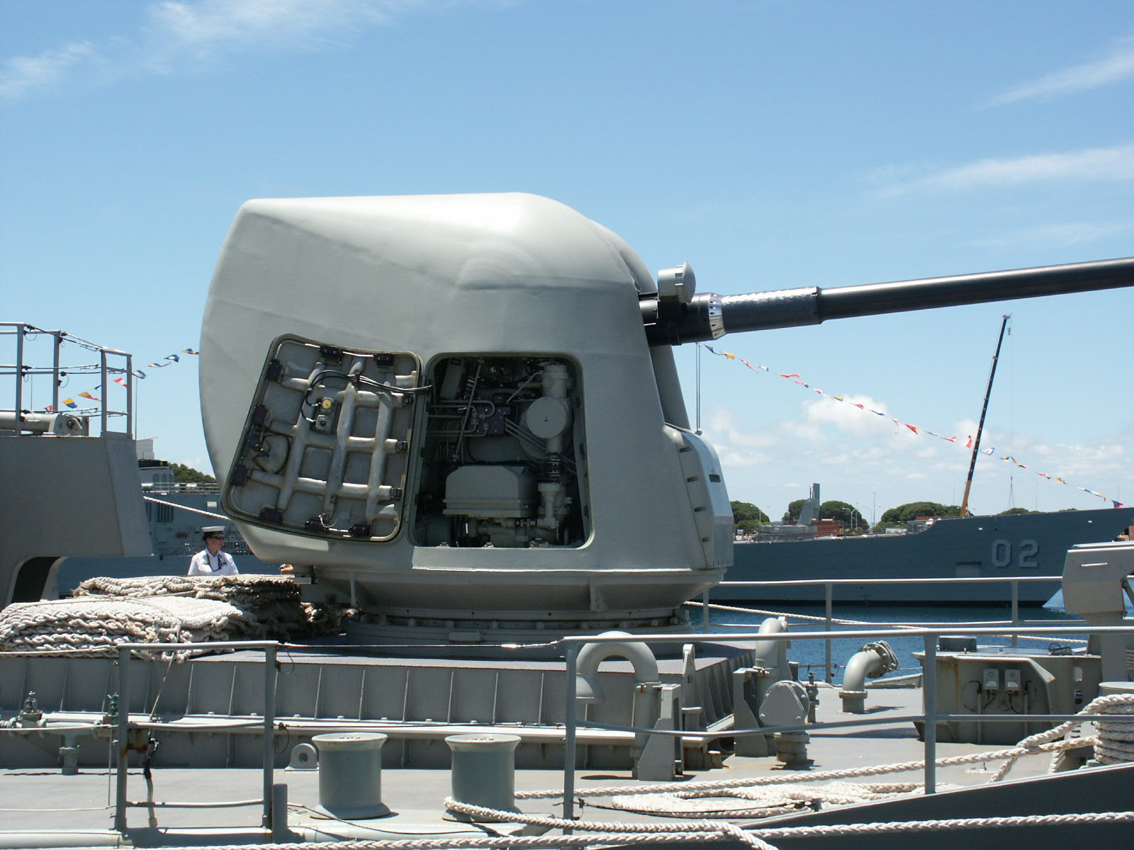 HMAS Arunta 5 inch gun, at Fleet Base West.